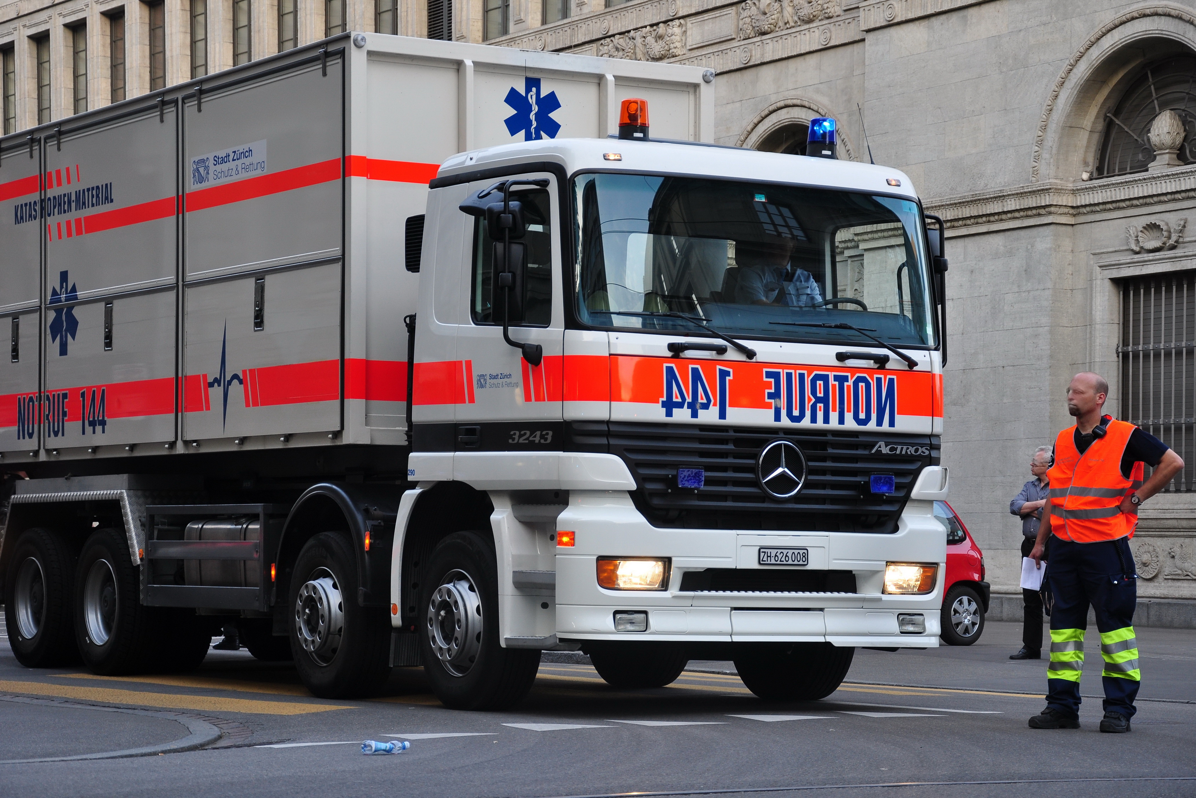 10 Jahre SRZ Jubiläumsanlass (13. und 14. Mai 2011) von Schutz & Rettung, Oldtimertreffen von Feuerwehrfahrzeugen der umliegenden Stadtgemeinden auf dem Münsterhof respektive Fahrzeugumzug (Bahnhofstrasse) in Zürich (Switzerland)